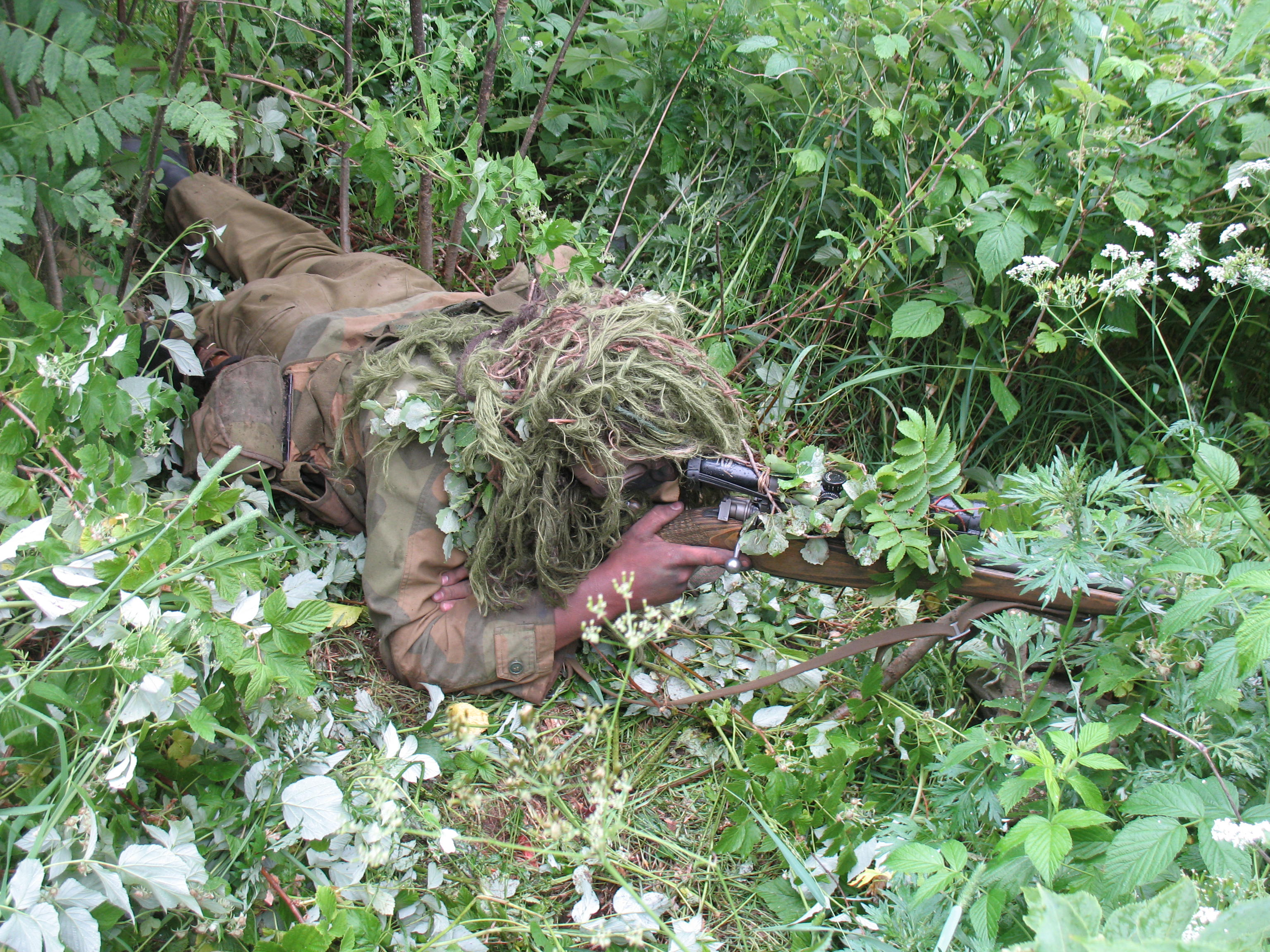 En skarpskytter i Hans Majestet Kongens Garde